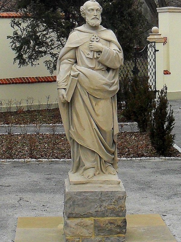 Wrocław, Ostrów Tumski, figura św. Piotra w ogrodzie kościoła pw. śś Piotra i Pawła